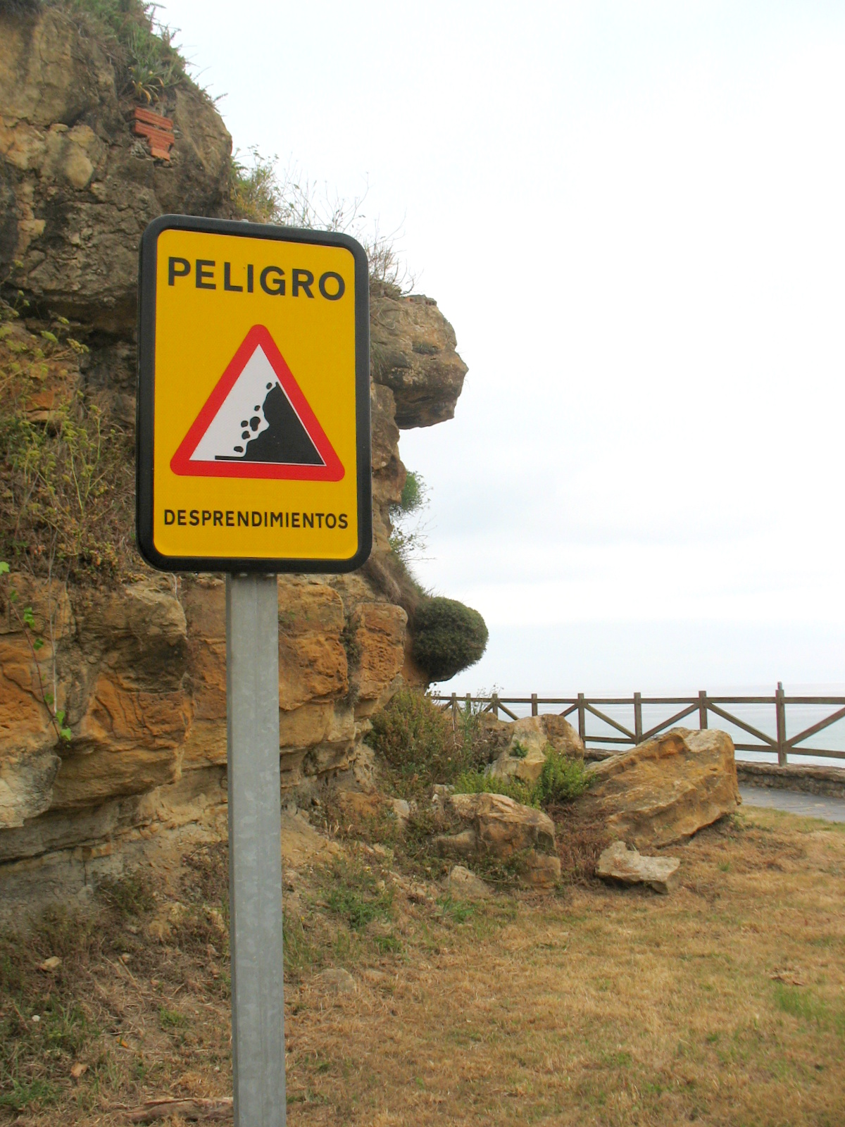 Señal de peligro por desprendimiento de rocas. Playa de Santa Justa, Santillana del Mar (Cantabria, España)